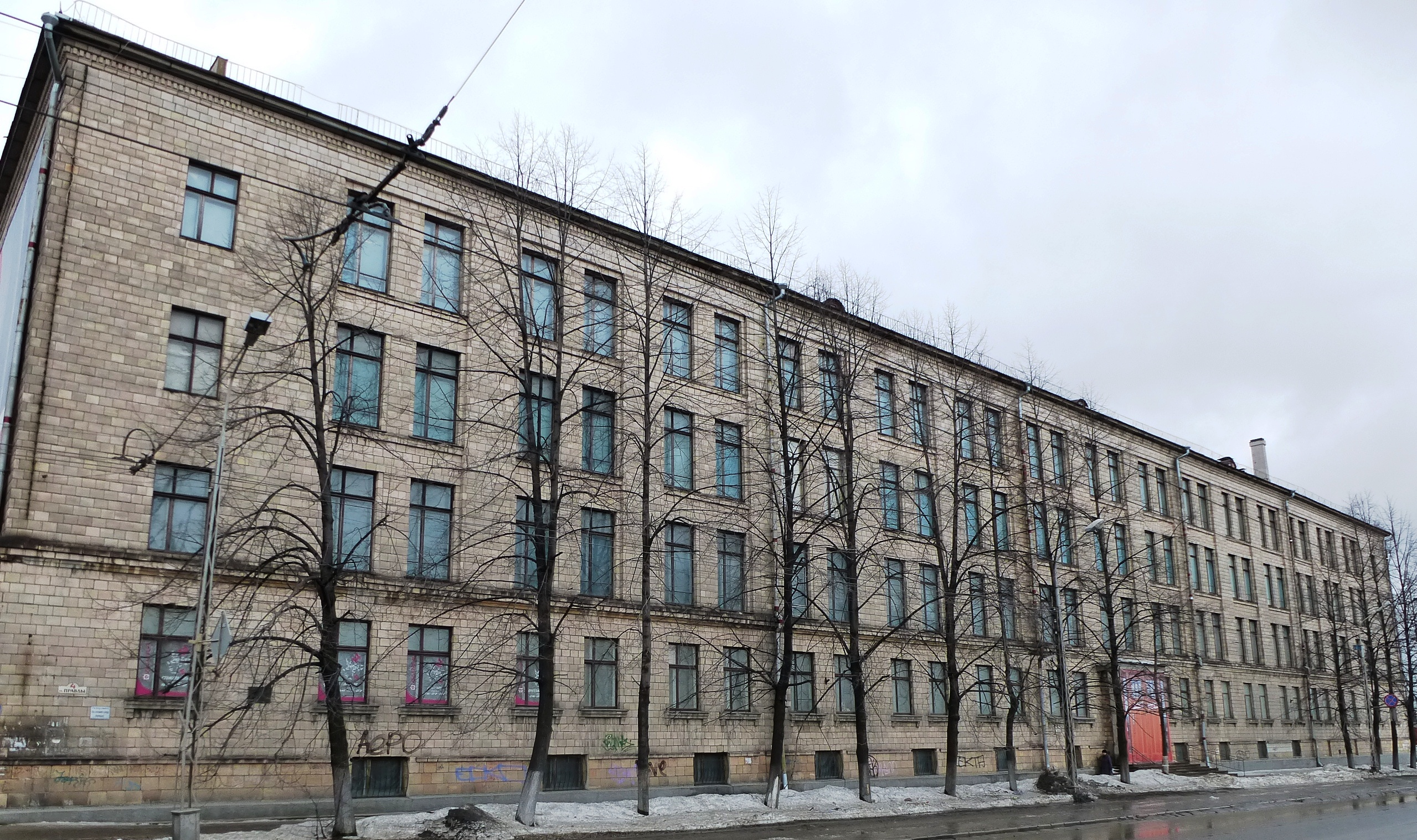 Здание бывшей Государственной типографии им.П.Ф.Анохина в Петрозаводске на ул.Правды